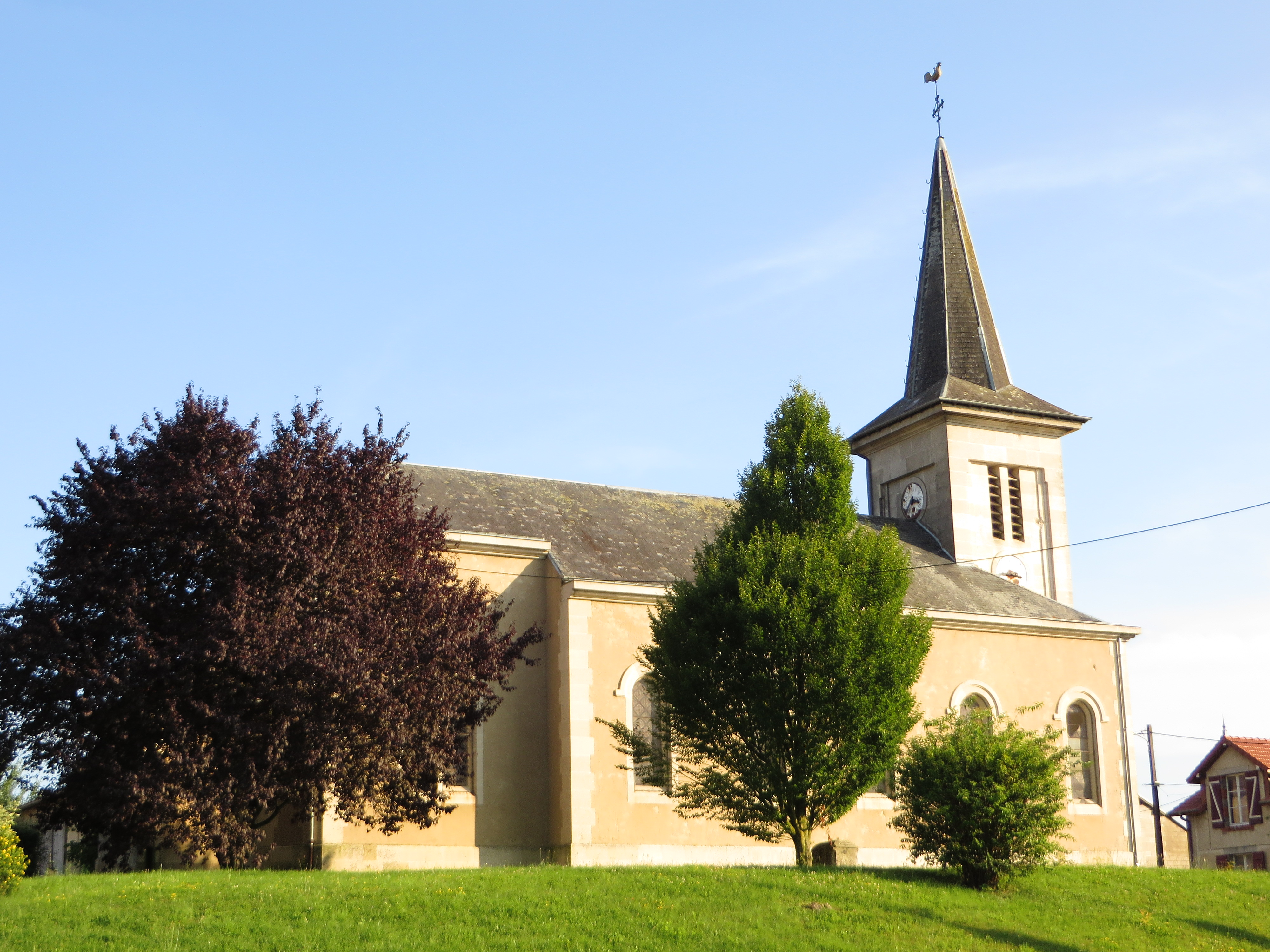 Epinonville Église Saint-Baldéric